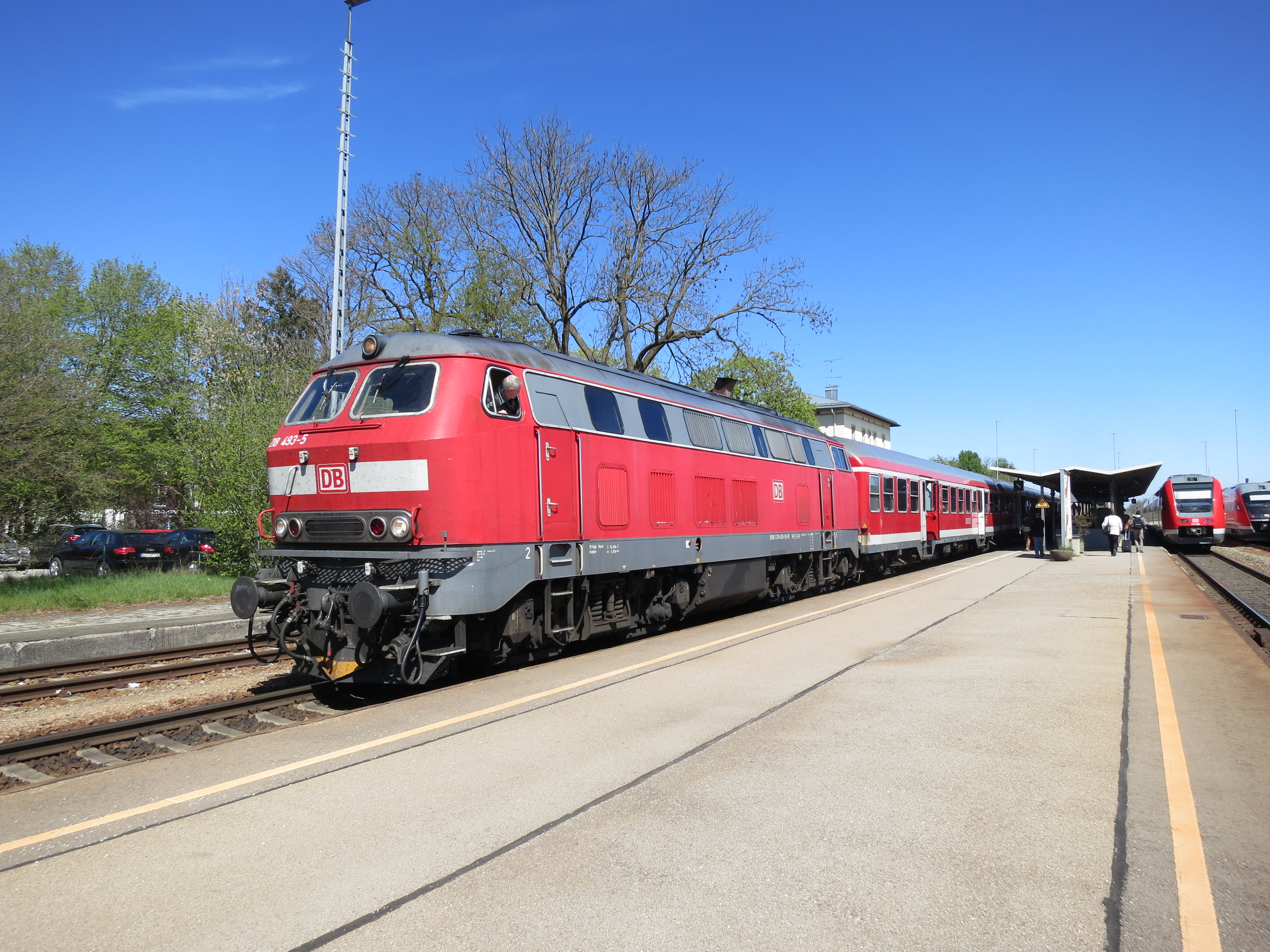 Diesellokomotive 218 493 mit n-Wagen im Bahnhof Kaufering, rechts Dieseltriebwagen der Baureihen 612 und 642